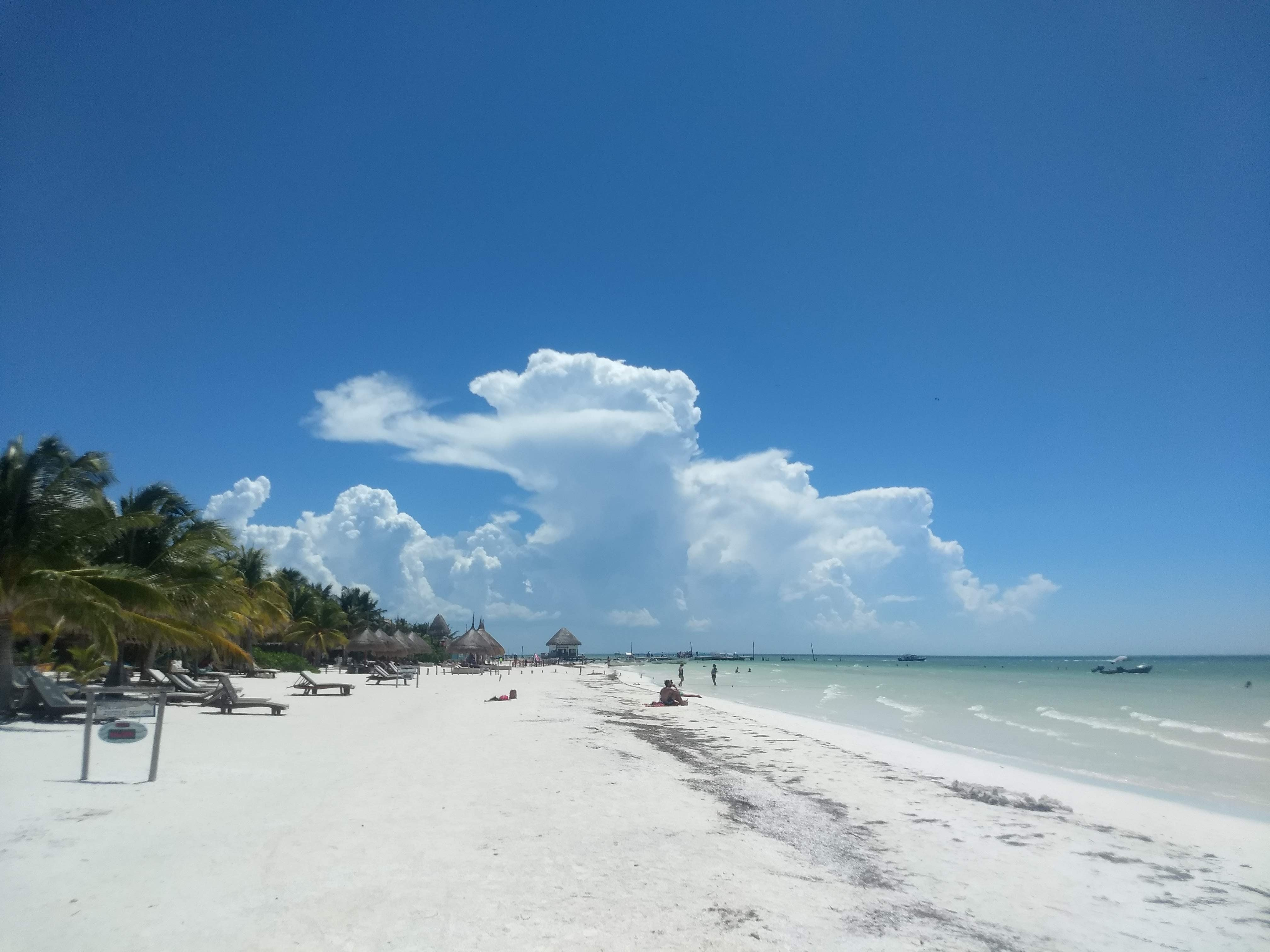 Playa Holbox, un lugar que permite admirar la tranquilidad y majestuosidad del océano